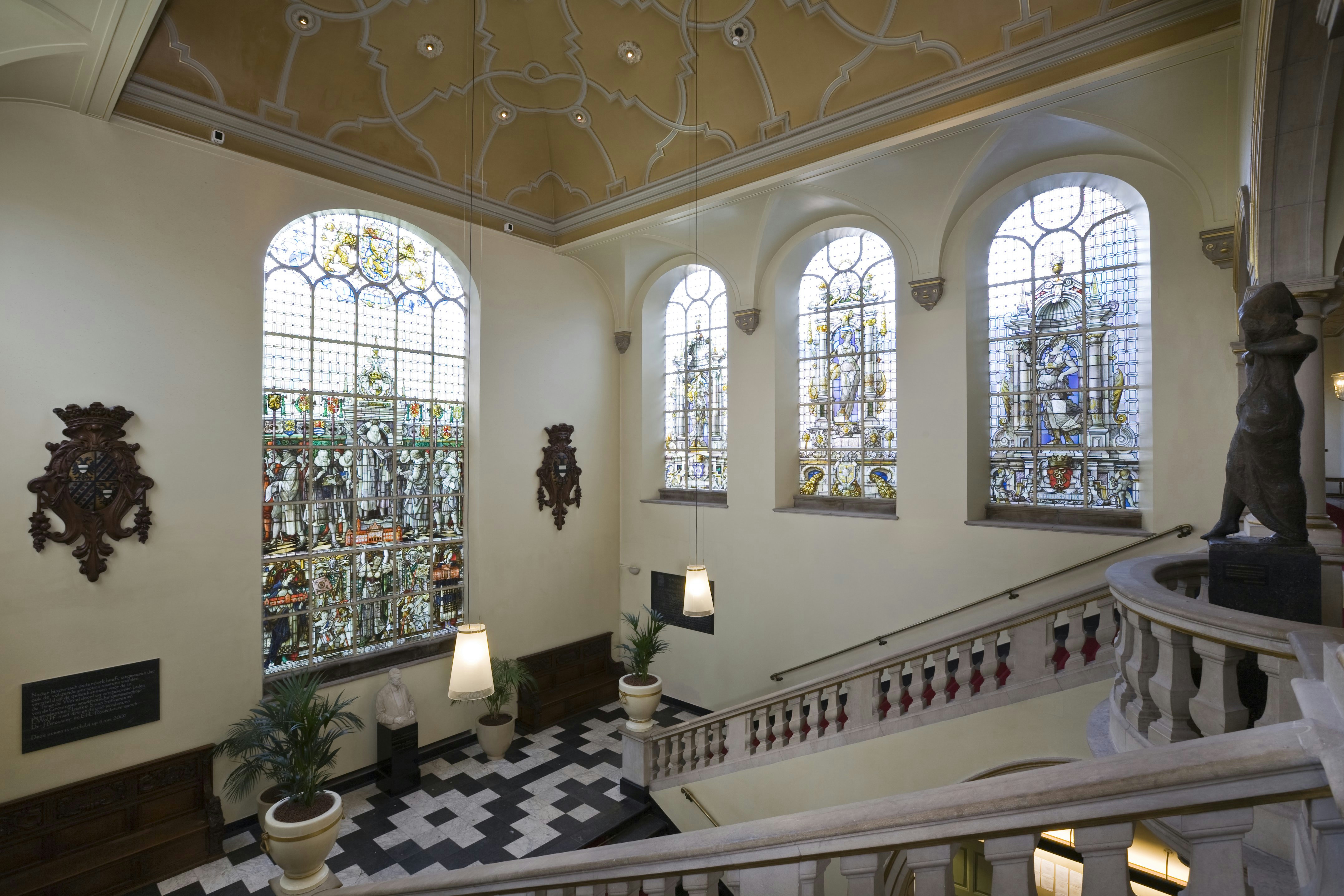 Universiteitsgebouw: Interieur, overzicht van het trappenhuis met de gebrandschilderde ramen